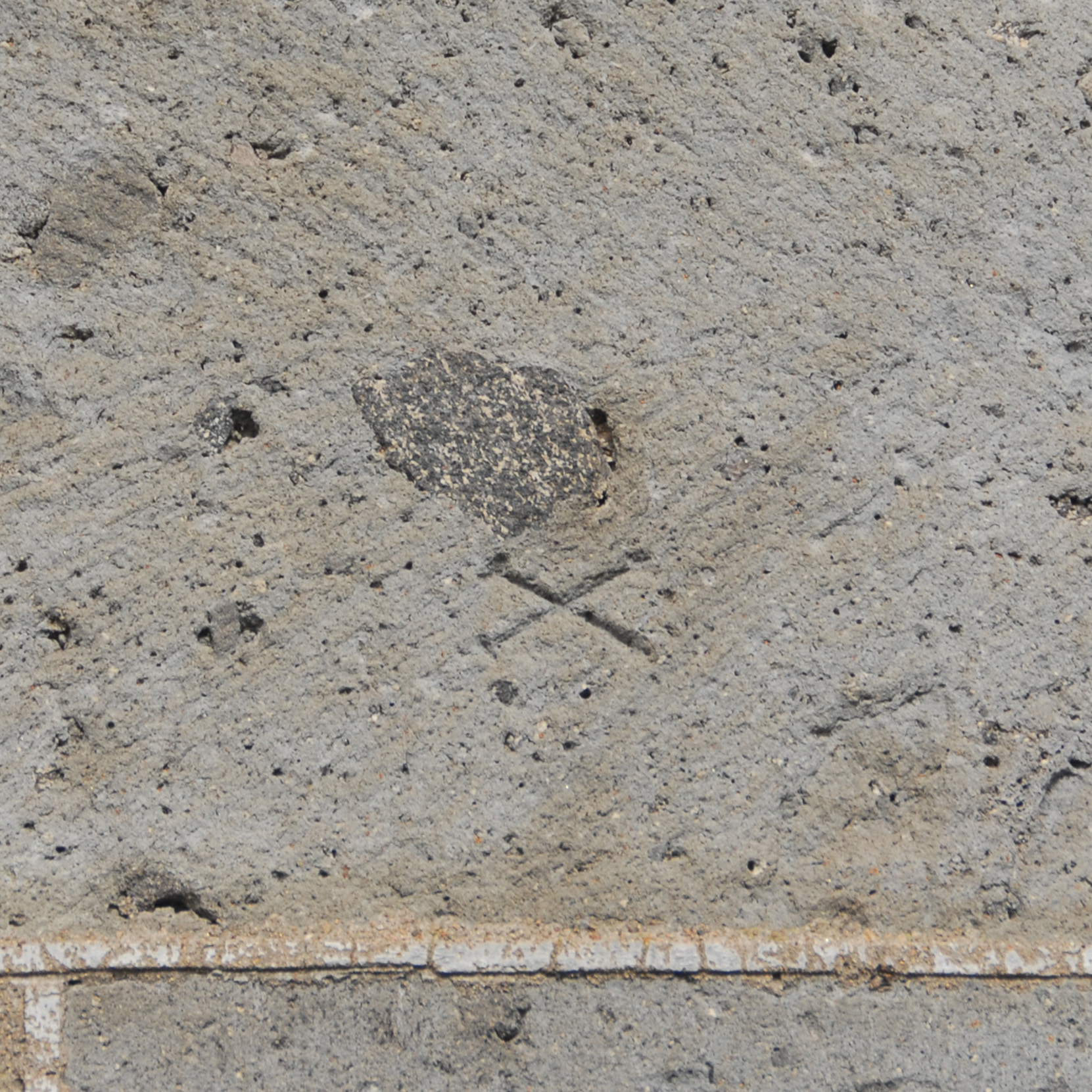 N.-D. d'Orcival, Steinmetzsignatur, X, Farnwedeloberfl.